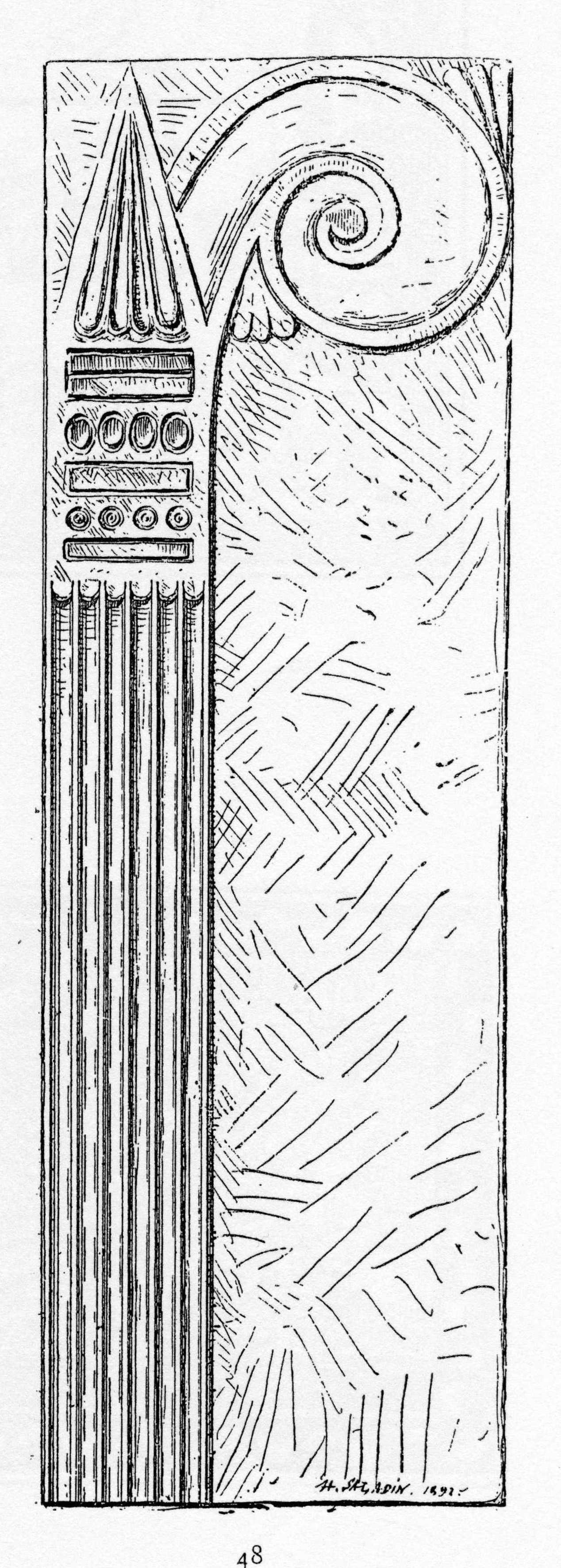 Chambranle de porte au Musée Alaoui